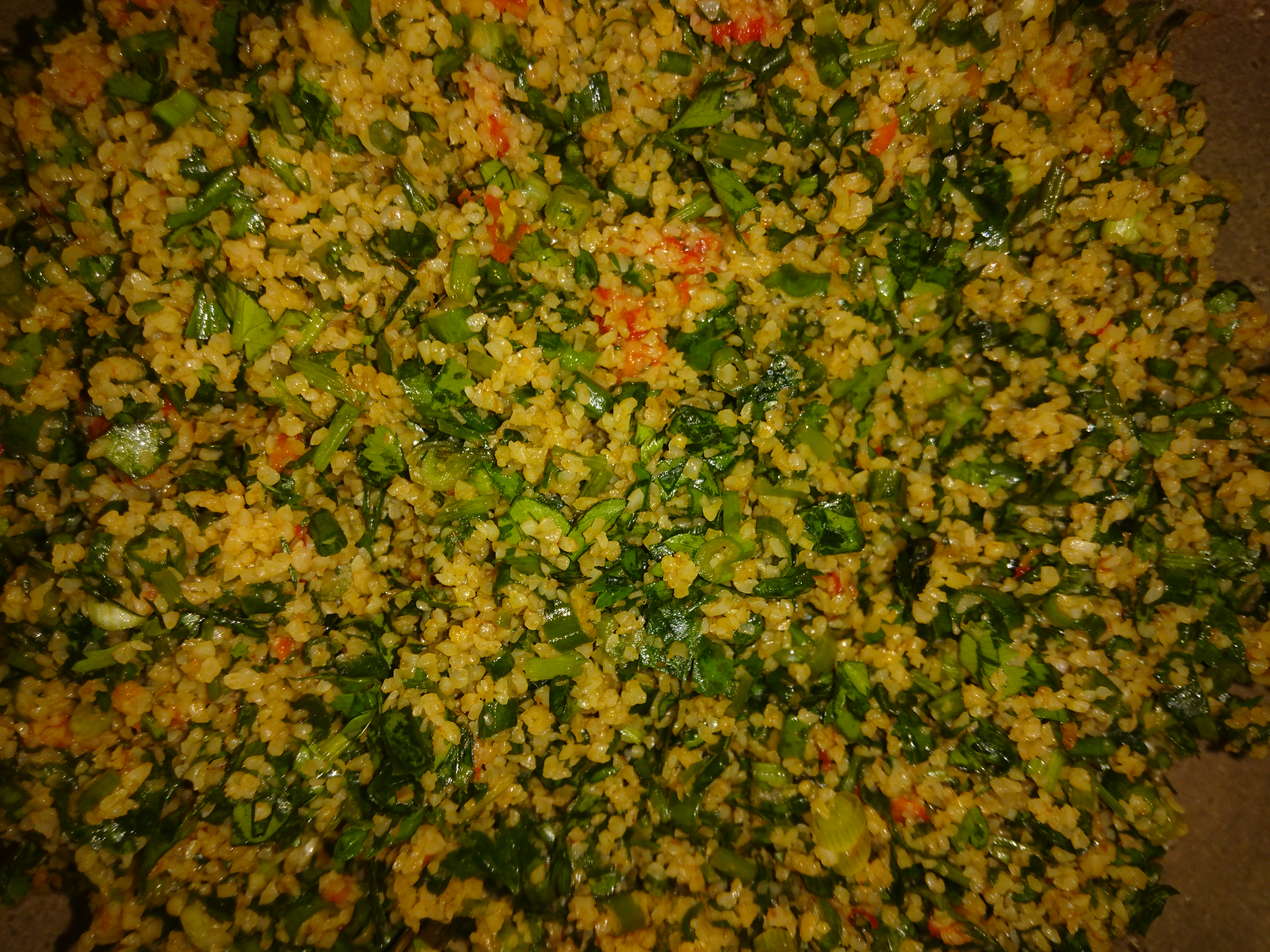 Թաբուլե առանց աղցանի տերևների